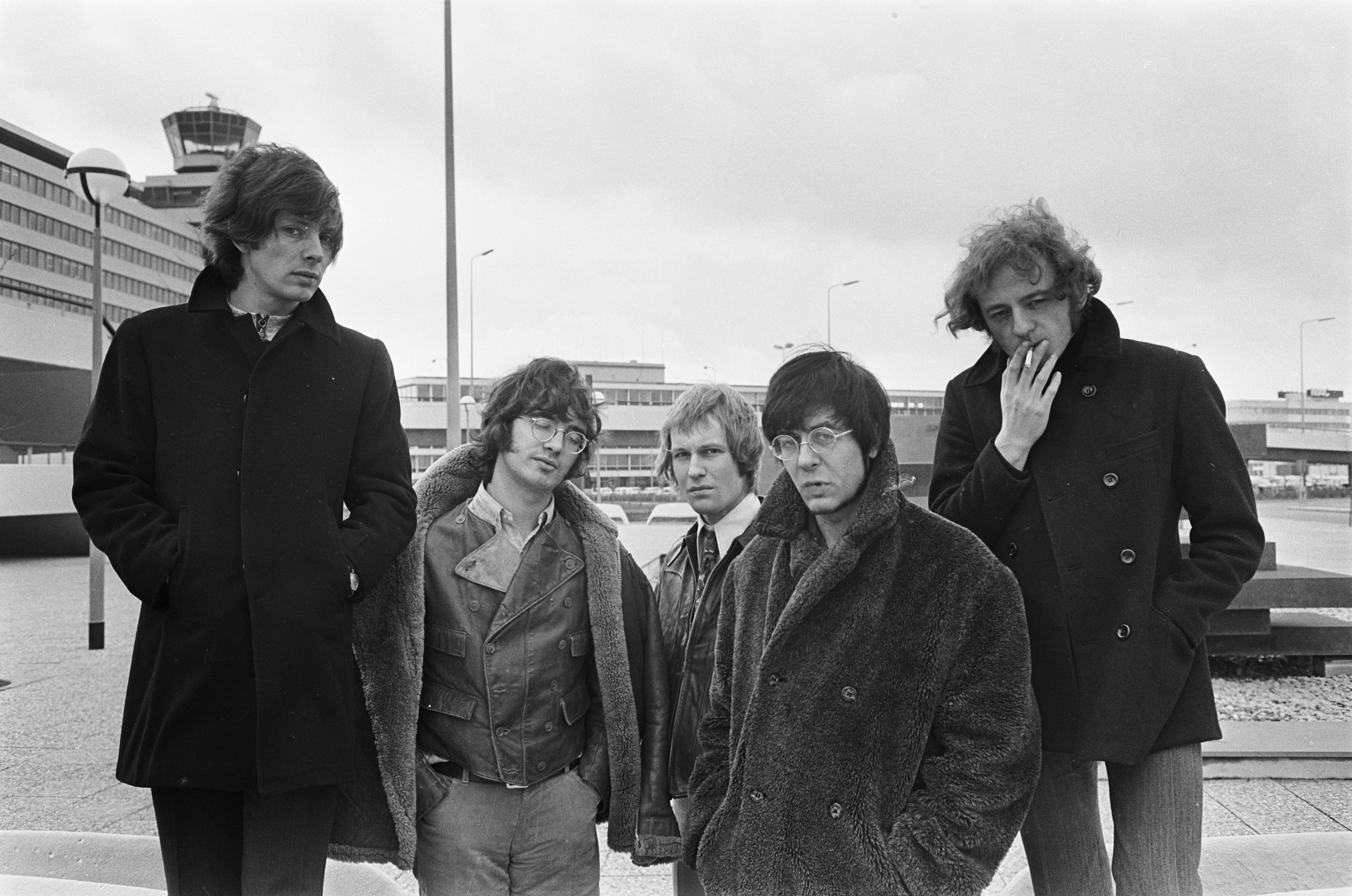 Collectie / Archief : Fotocollectie Anefo Reportage / Serie : [ onbekend ] Beschrijving : Aankomst Manfred Mann (tweede van rechts) en zijn groep op Schiphol Datum : 22 maart 1968 Locatie : Noord-Holland, Schiphol Trefwoorden : aankomst en vertrek, bands, groepsportretten, popmuziek Persoonsnaam : Mann, Manfred Fotograaf : Koch, Eric / Anefo Auteursrechthebbende : Nationaal Archief Materiaalsoort : Negatief (zwart/wit) Nummer archiefinventaris : bekijk toegang 2.24.01.05 Bestanddeelnummer : 921-1860